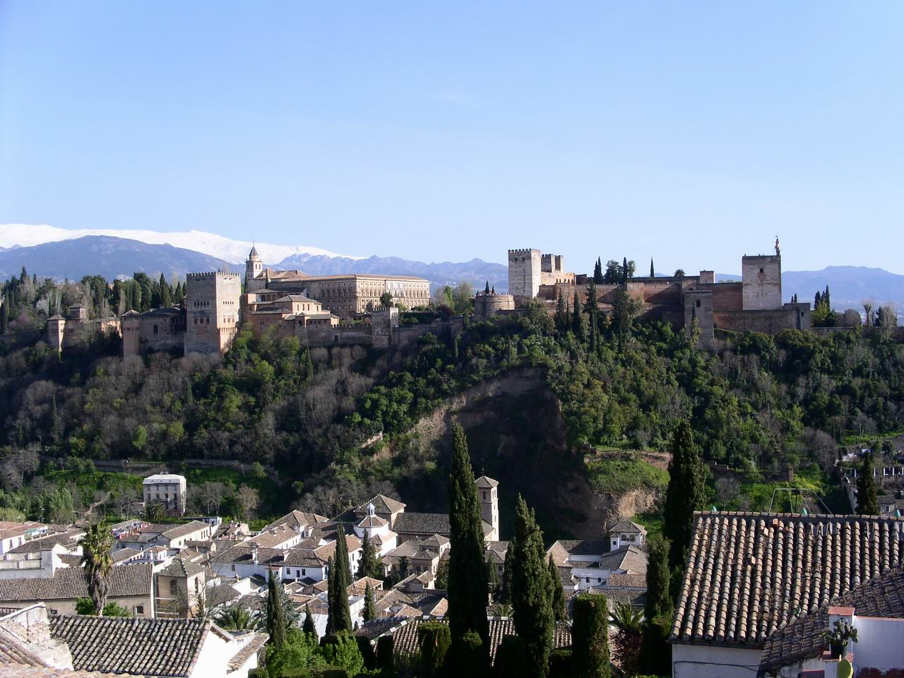 Die Alhambra in Granada, Spanien.